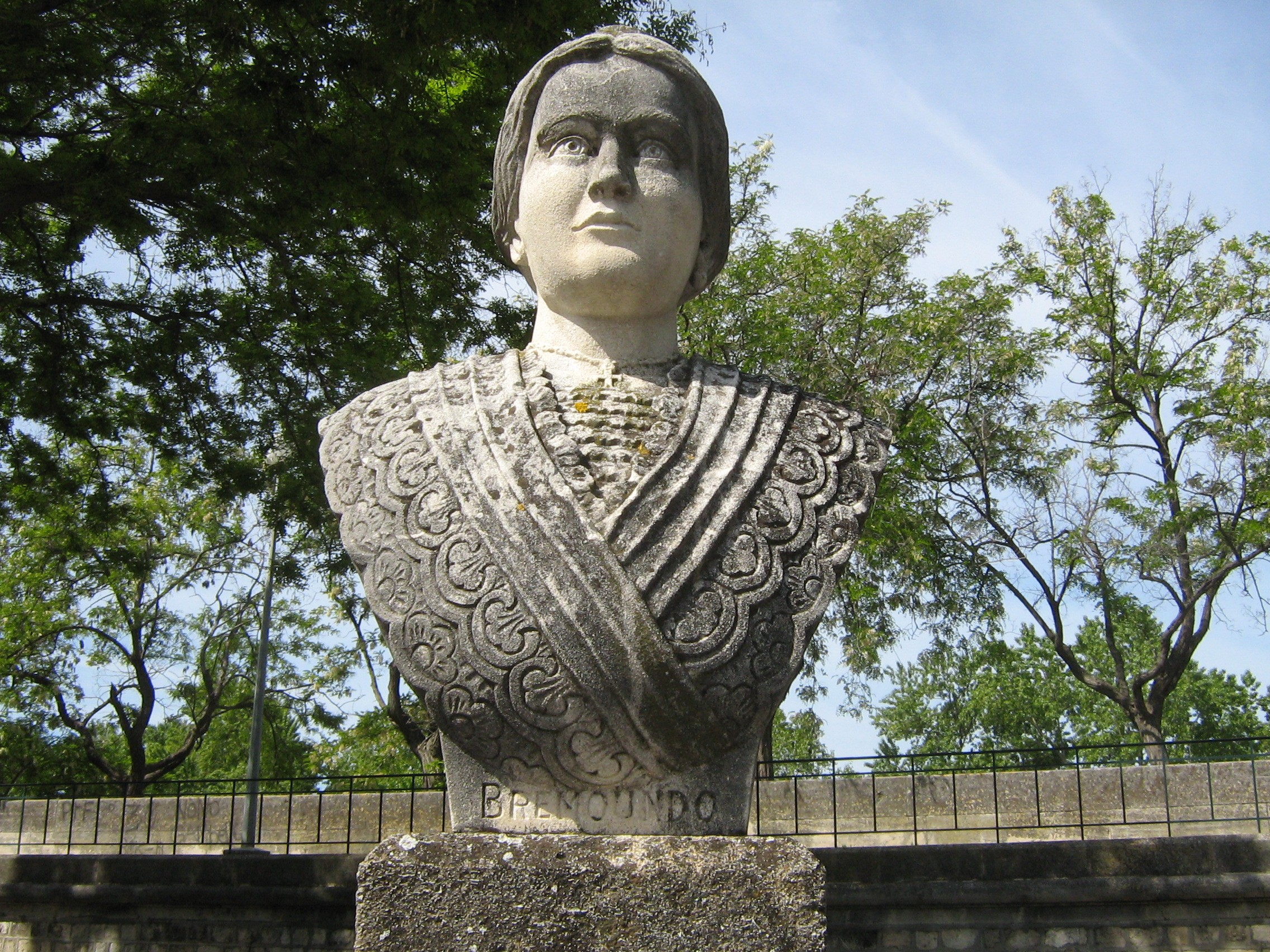 satue Brémonde Tarascon